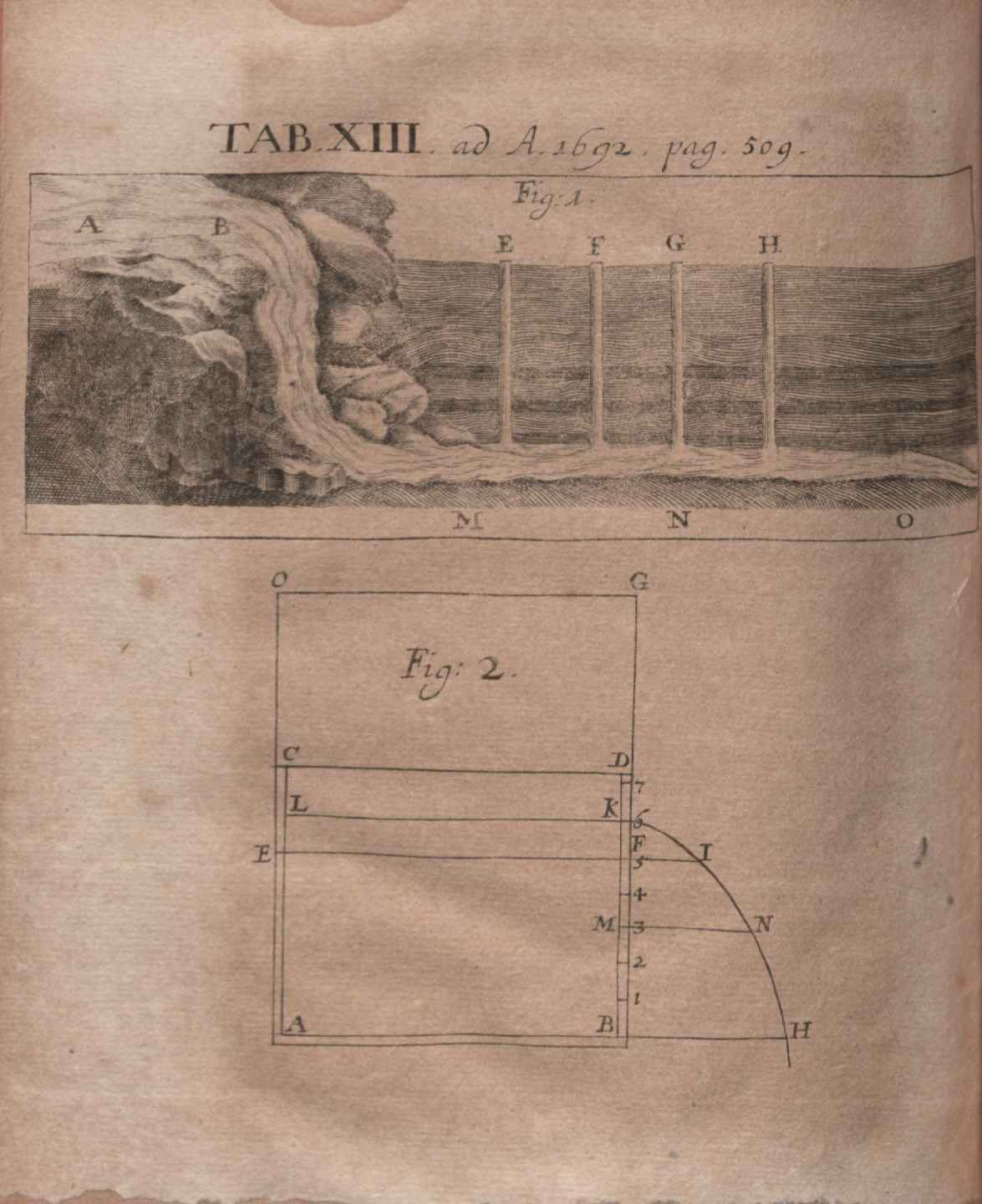 Illustration